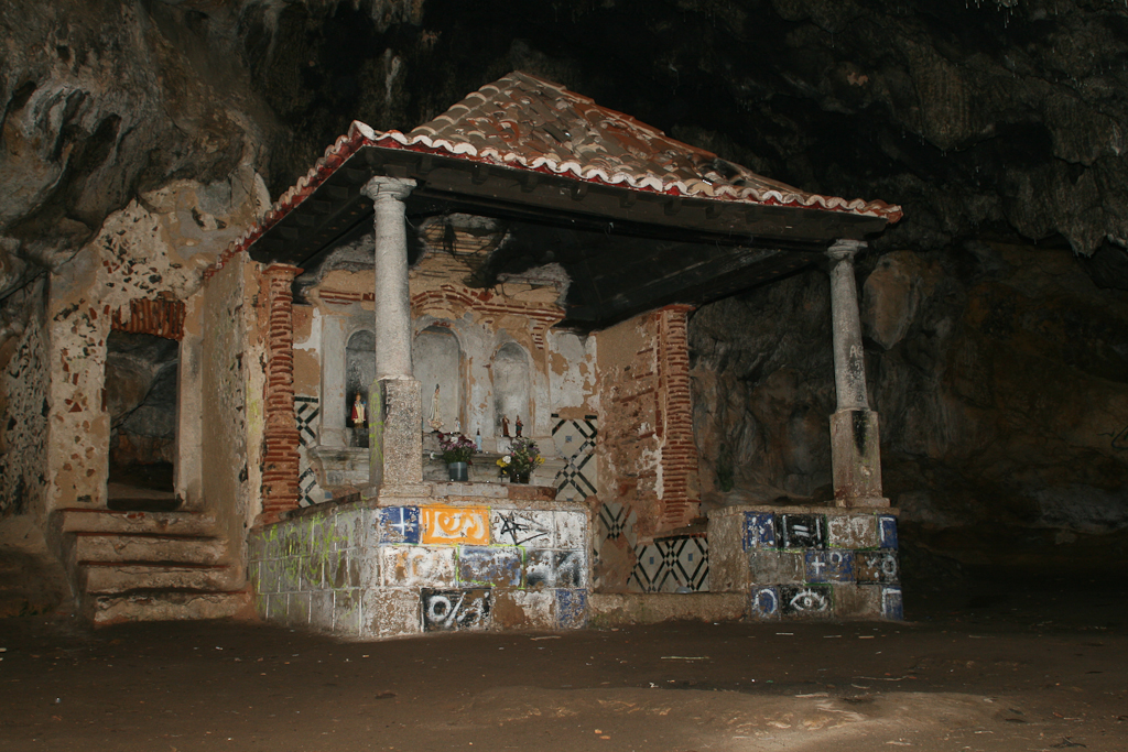 Santuário dentro de gruta de Santa Margarida. Arrábida. Portugal. " Vasta e maravilhosa, a maior beleza da Natureza na Arrábida. Tem duas entradas, uma sobre o mar e outra do lado da serra, com bom caminho mandado construir pela Comissão de Inciativa de Setúbal. Tem fortes colunas formadas por estalactites e estalagmites. Ao fundo da gruta há uma pequena capela com o altar de Santa Margarida, à esquerda a porta da sacristia metida na rocha e a pequena distância um púlpito em pedra. A capela é cercada de gradeamento de madeira e defendida da humidade por um telhado. Em 1606 teve confraria. À entrada, do lado da serra, há um elegante cruzeiro. Do lado do mar está um penedo denominado do Duque, desde o tempo em que D. Álvaro de Lencastre nele se divertia na curiosa pesca da cana." Mais Informação